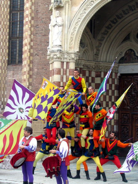 Palio asti sbandieratori